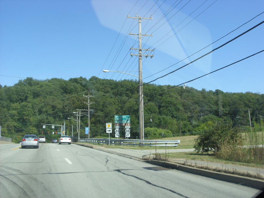 Allegheny County Belt Route System - Pennsylvania